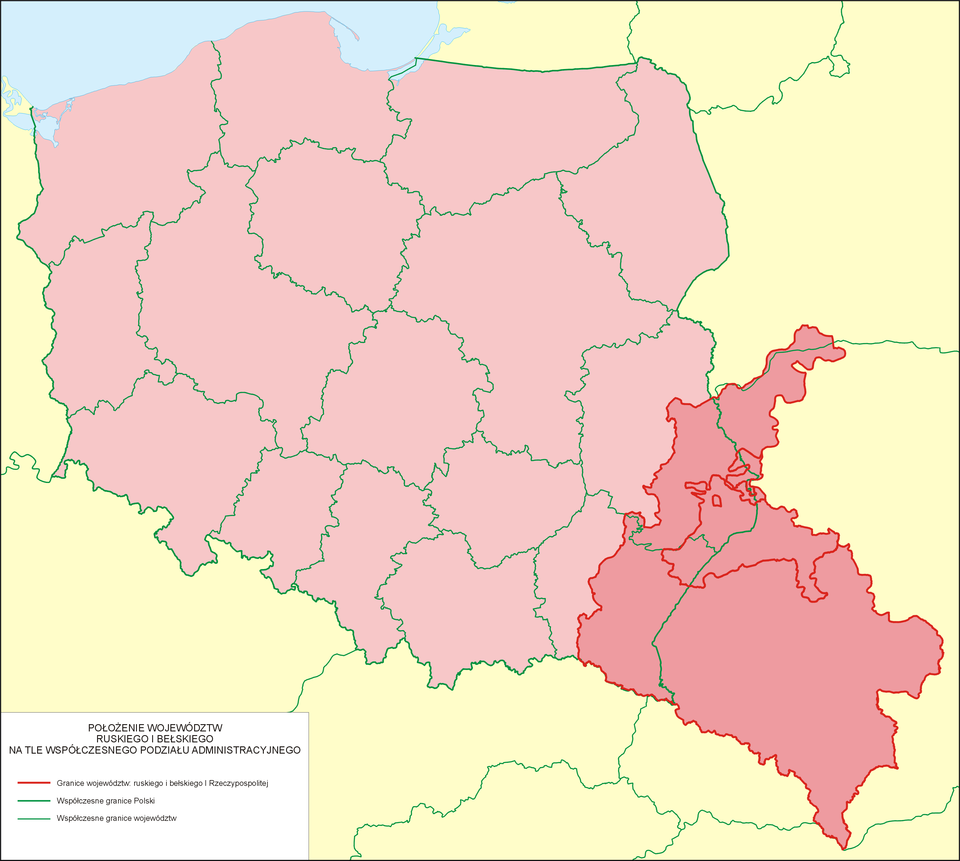 Położenie województw ruskiego i bełskiego I Rzeczypospolitej na tle współczesnego podziału administracyjnego